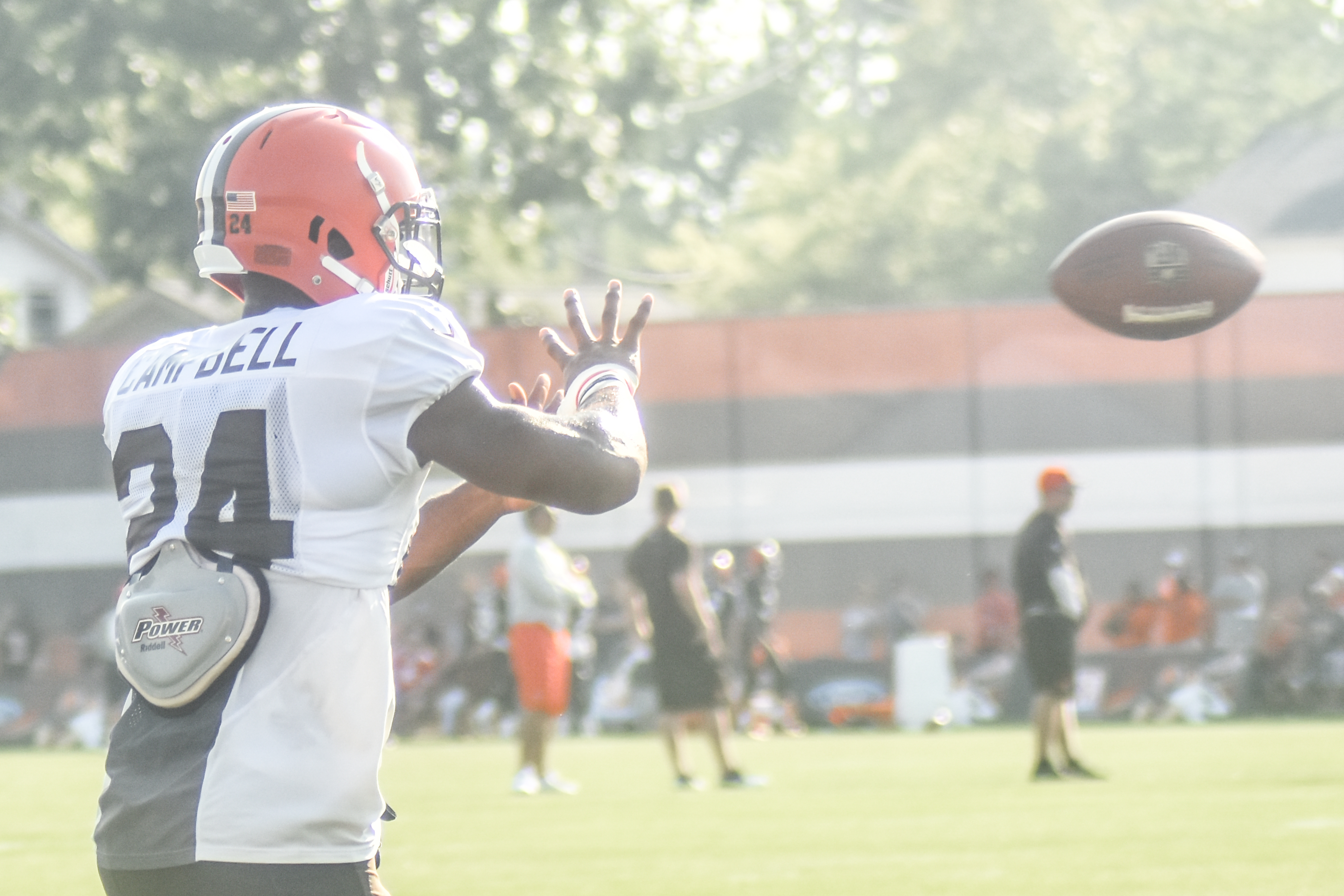 Ibraheim Campbell